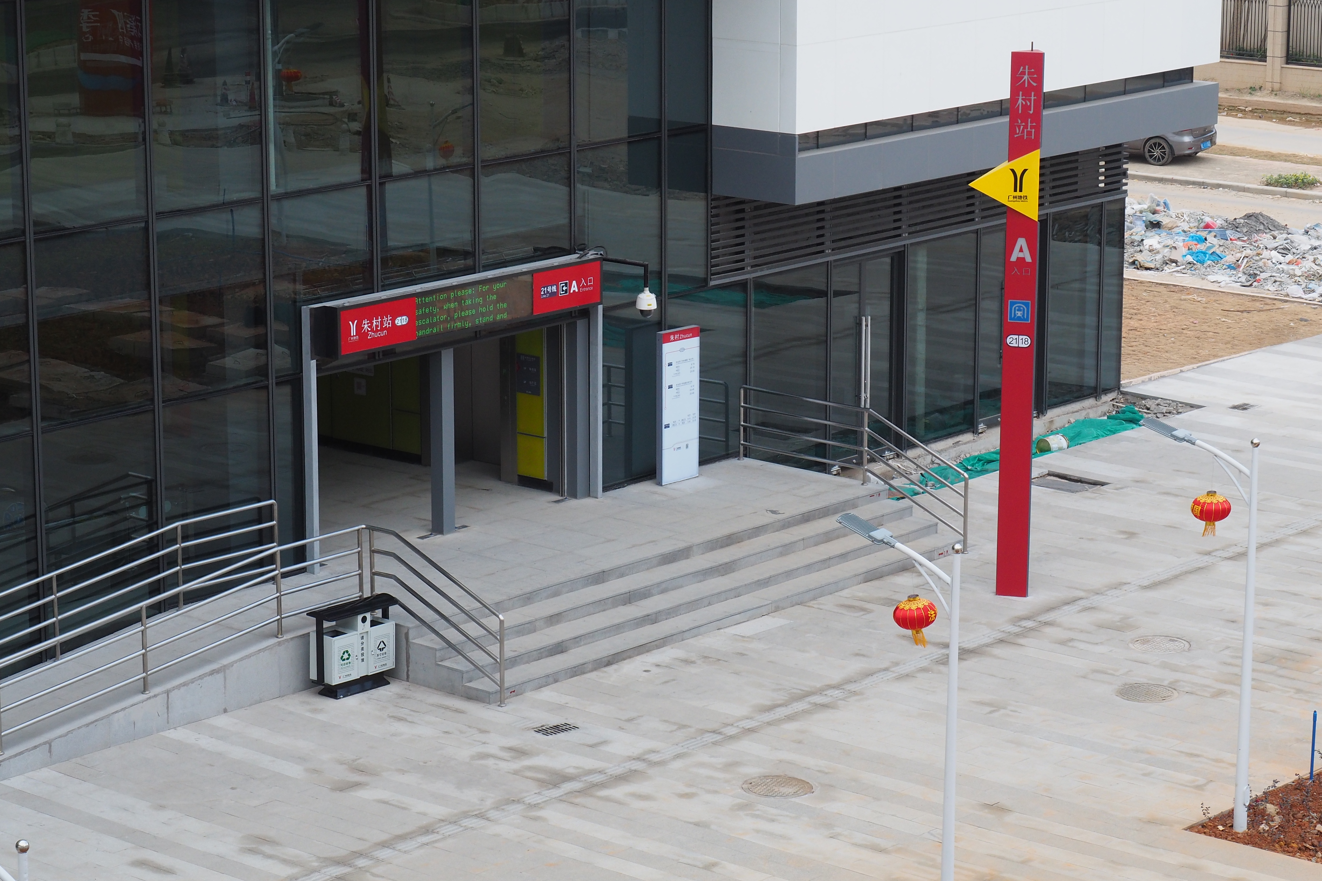 中文（中国大陆）: 广州地铁21号线朱村站A入口。